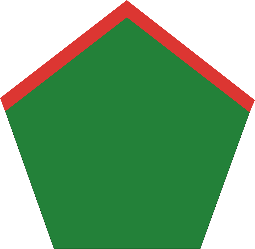 Patka artylerii ciężkiej (na kołnierz) wprowadzona w Wojsku Polskim w Anglii w 1941